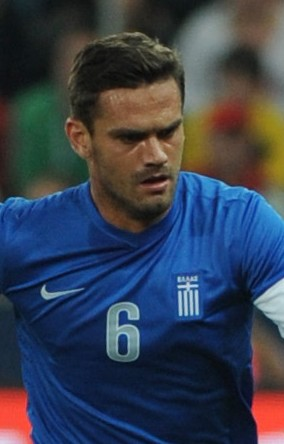 Freundschaftliches Länderspiel Österreich - Griechenland am 14. August 2013 in Salzburg: Alexandros Tziolis